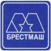 Лагатып Брэстмаша